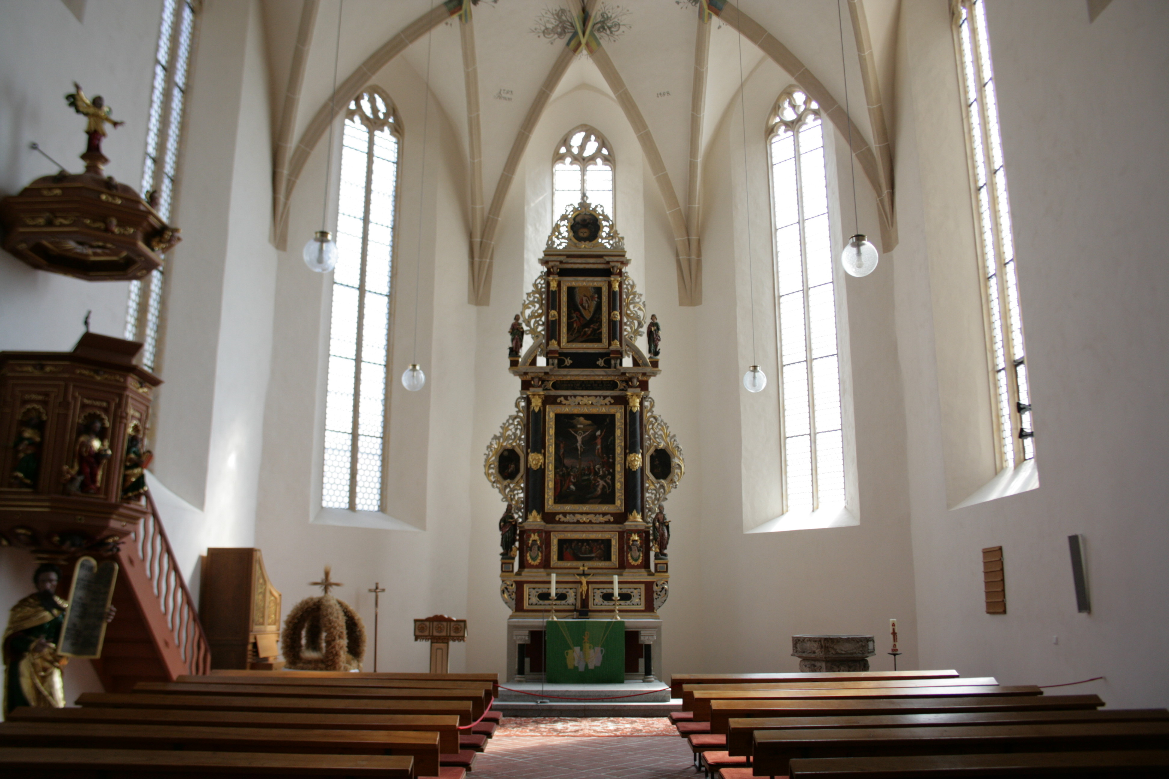 Michaeliskirche am Wendischen Kirchhof in Bautzen Hornjoserbsce: Michałska cyrkej při Serbskim kěrchowje w Budyšinje.